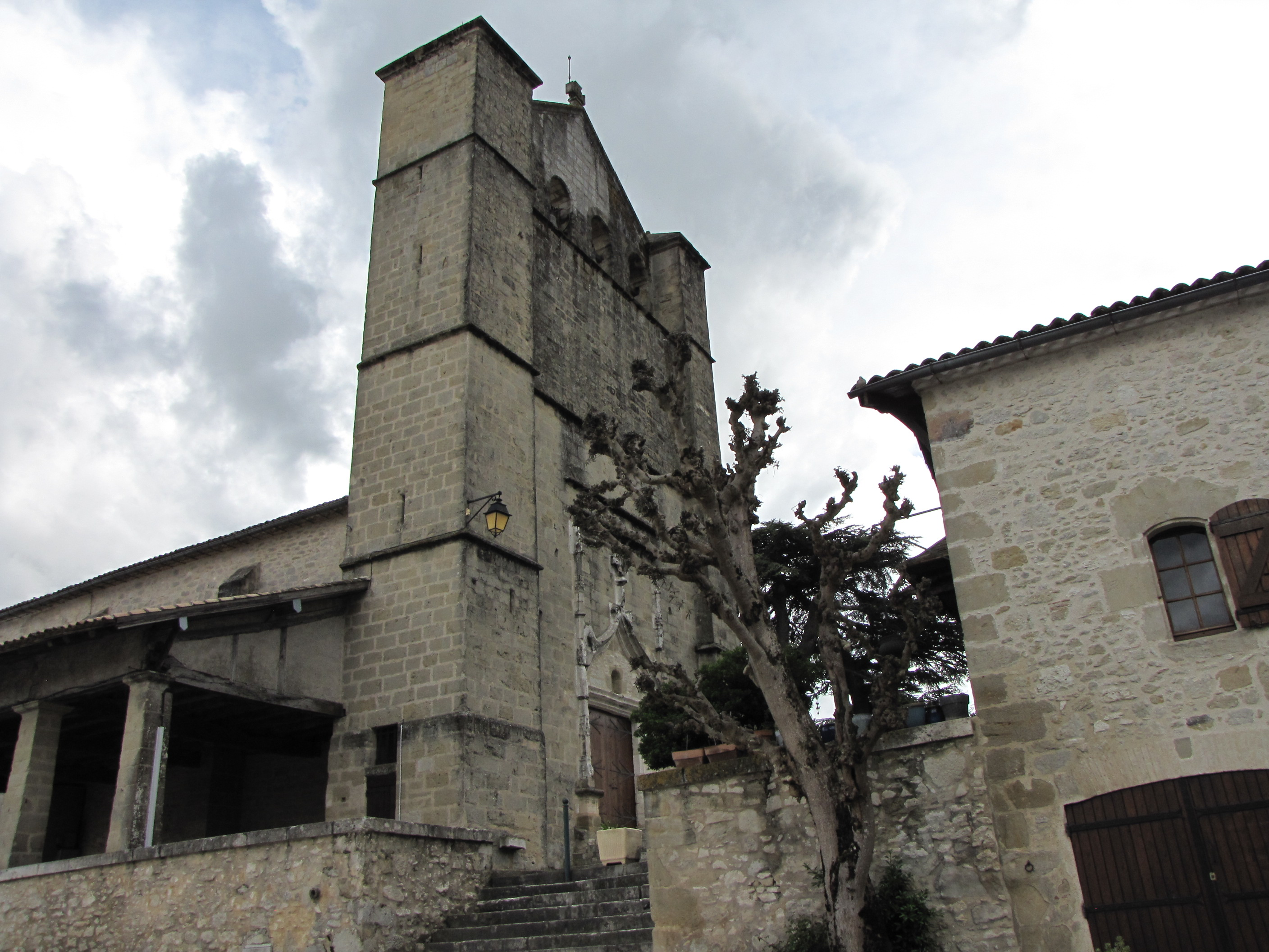 Église de Lougratte